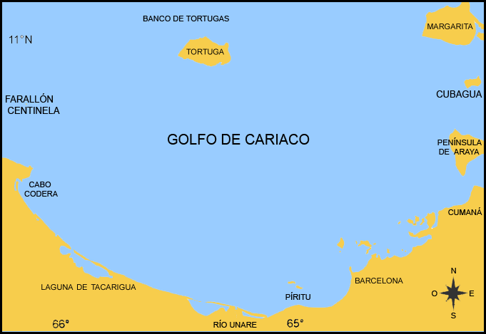 Mapa del Golfo de Cariaco, Venezuela